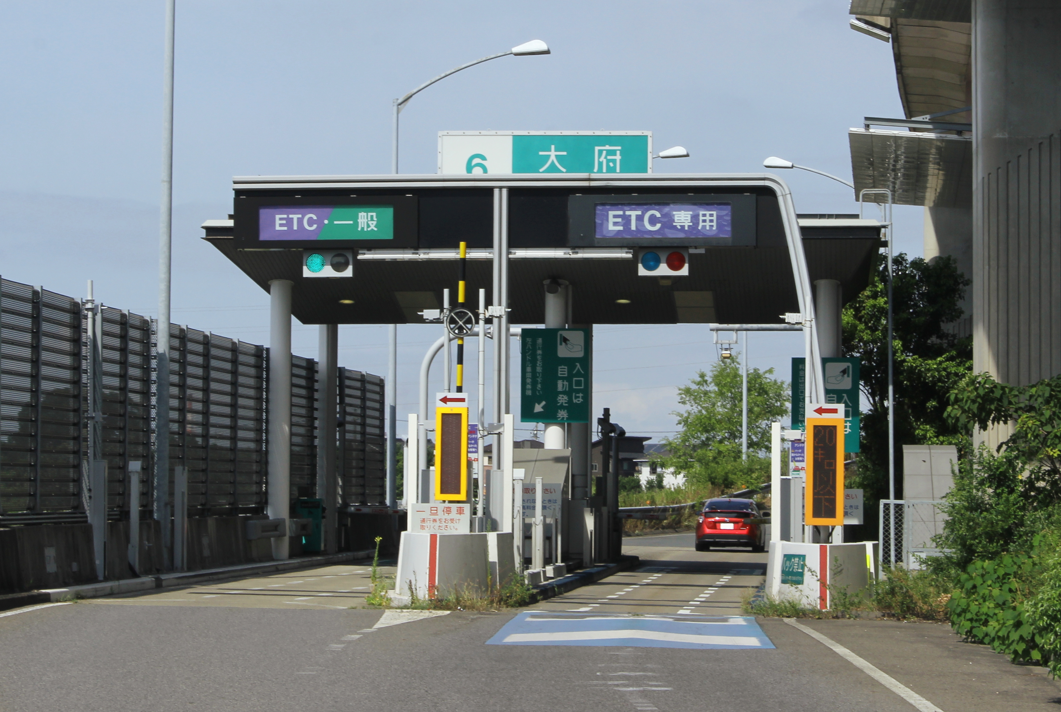 伊勢湾岸自動車道（第二東名）大府インターチェンジ（四日市方面）トールゲート